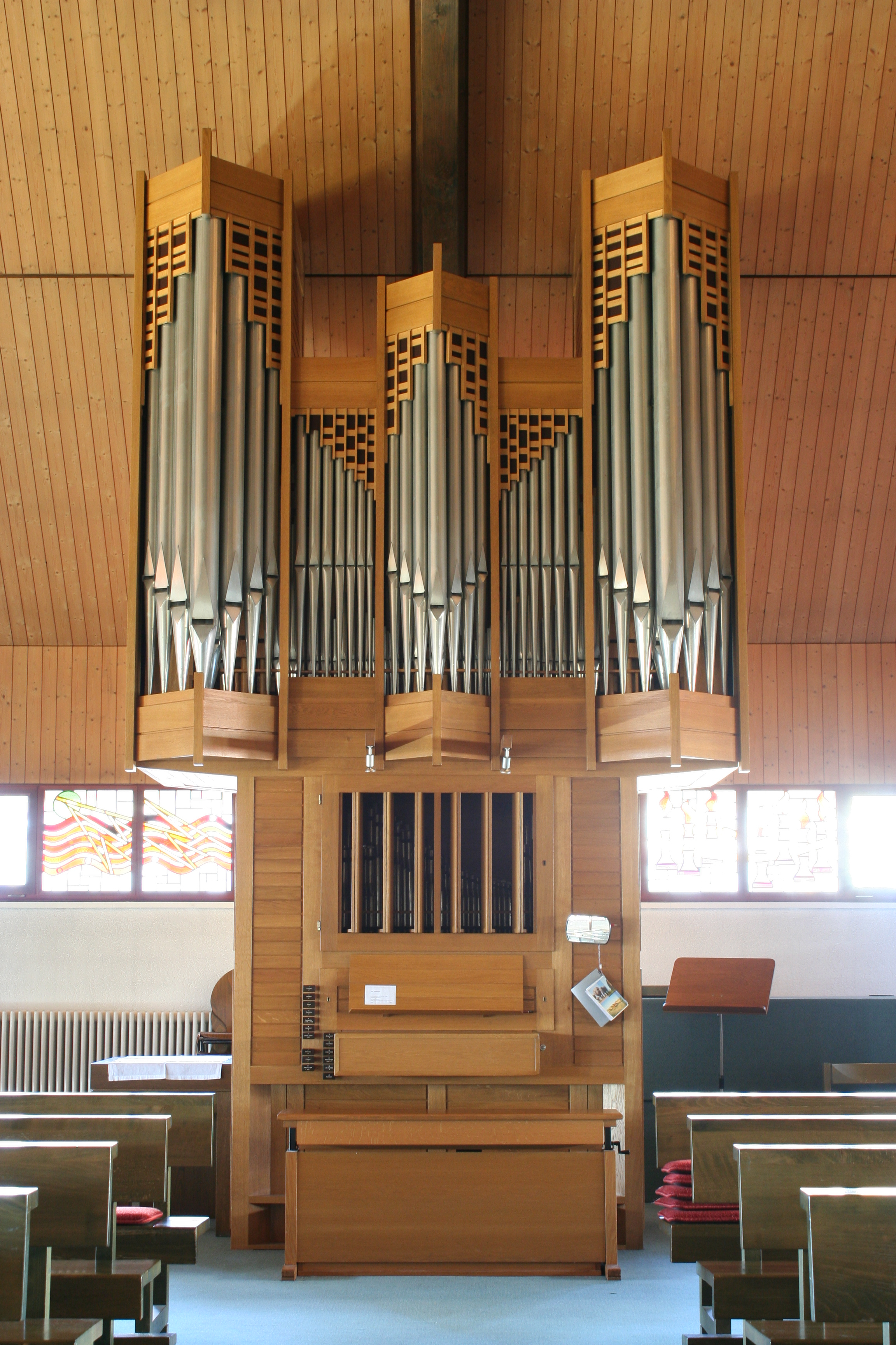 Römisch-katholische Kirche Heilig Geist Wetzikon, Orgel